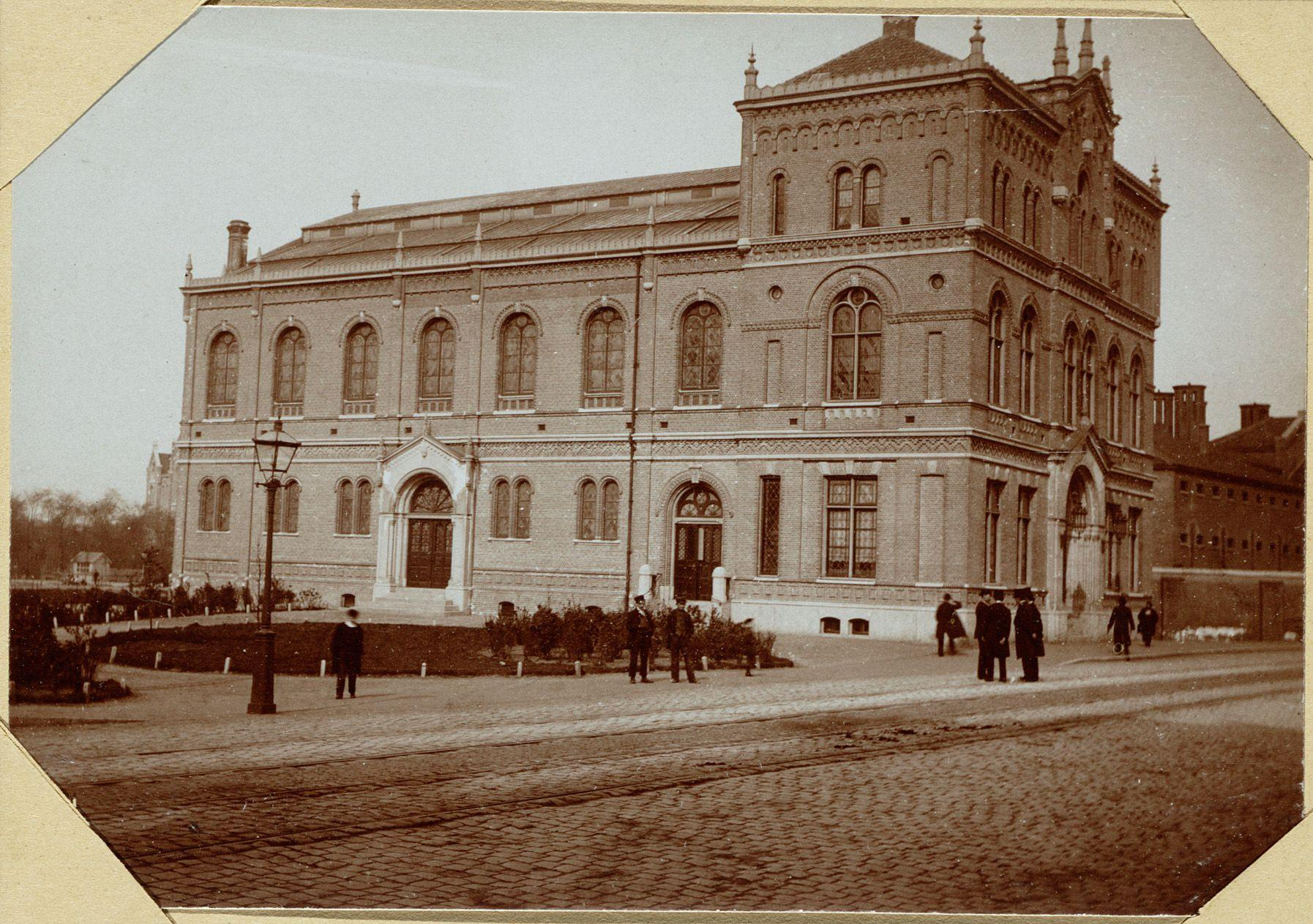 Beschrijving Het kerkgebouw der Vrije Gemeente aan de WeteringschansGezicht op het kerkgebouw van de Vrije Gemeente, Weteringschans 6-8, ontworpen de architect A. Salm. Oorspronkelijke kabinetfoto uitgegeven door A. Jager. Foto 236 uit het album van W.J.R. DreesmannDocumenttype fotoVervaardiger Jager, A.Collectie Collectie Atlas DreesmannDatering 1880 t/m 1883Geografische naam WeteringschansInventarissen 010094000654 Generated with Dememorixer